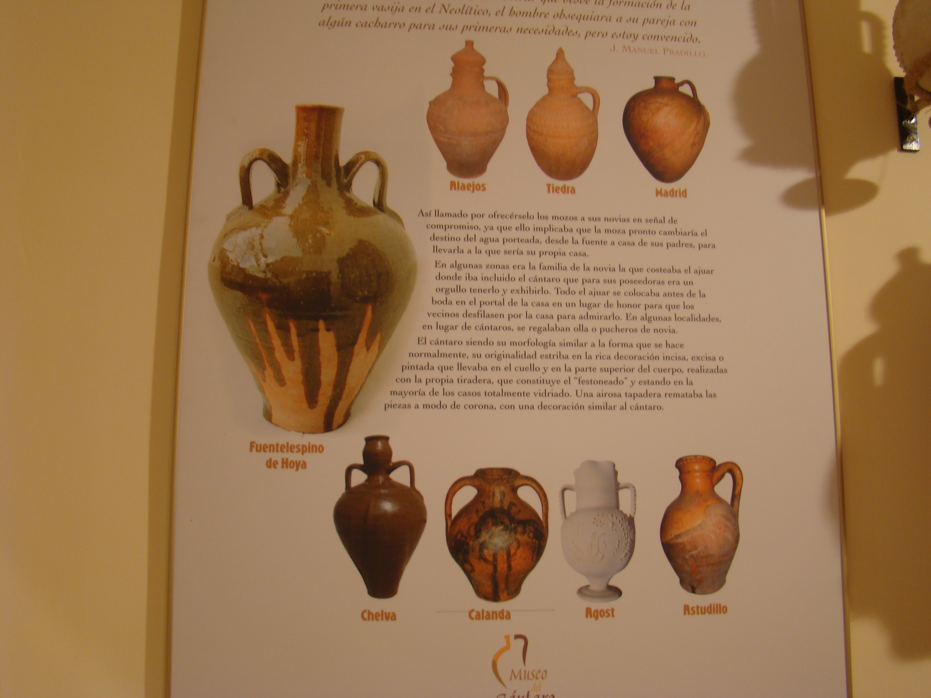 Cartela con la identificación de los diferentes tipos de "cántaro de novia". Museo del Cántaro, Valoria la Buena, provincia de Valladolid, España.